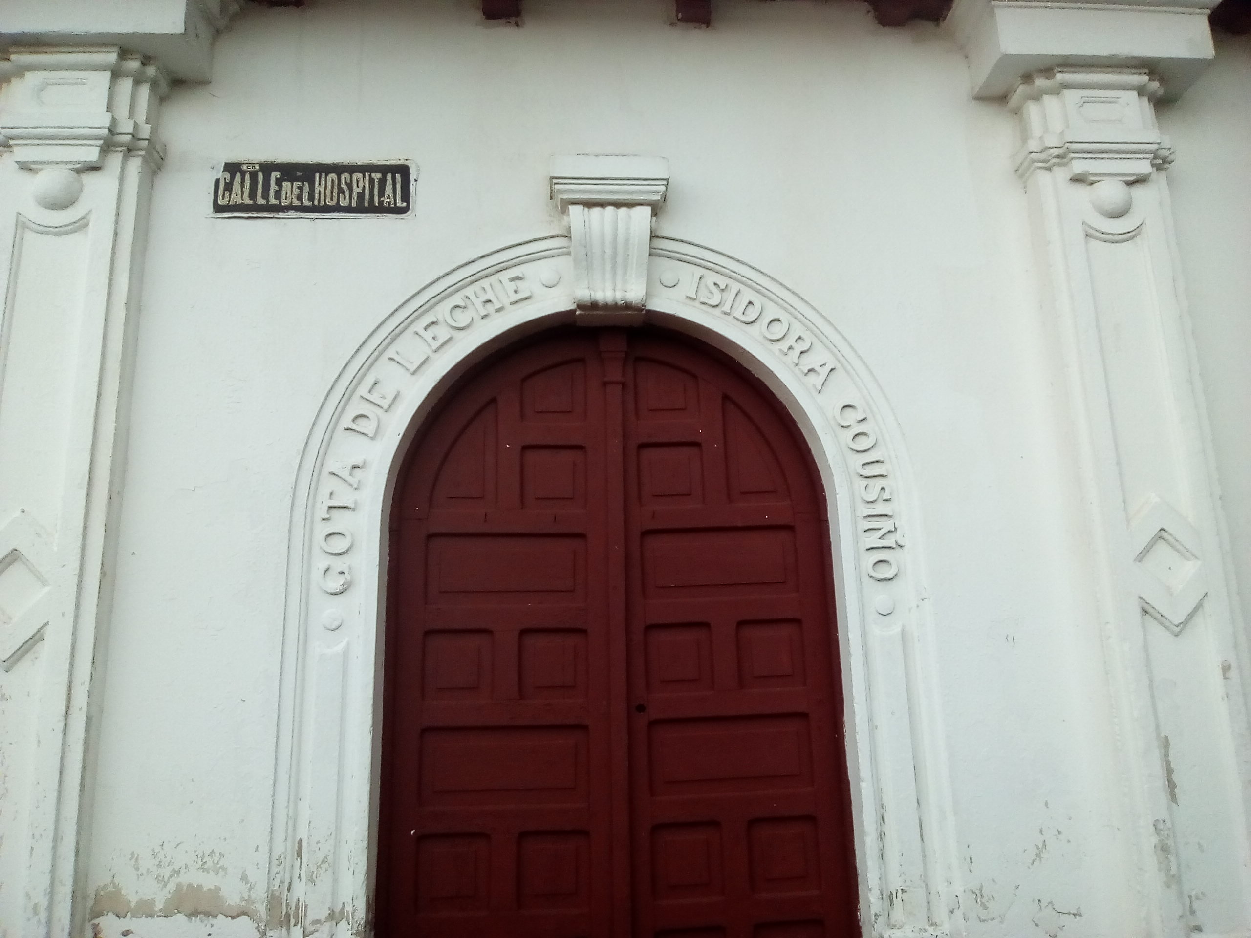 Monumento Nacional "Gota de Leche" de Lota, VIII región , Chile